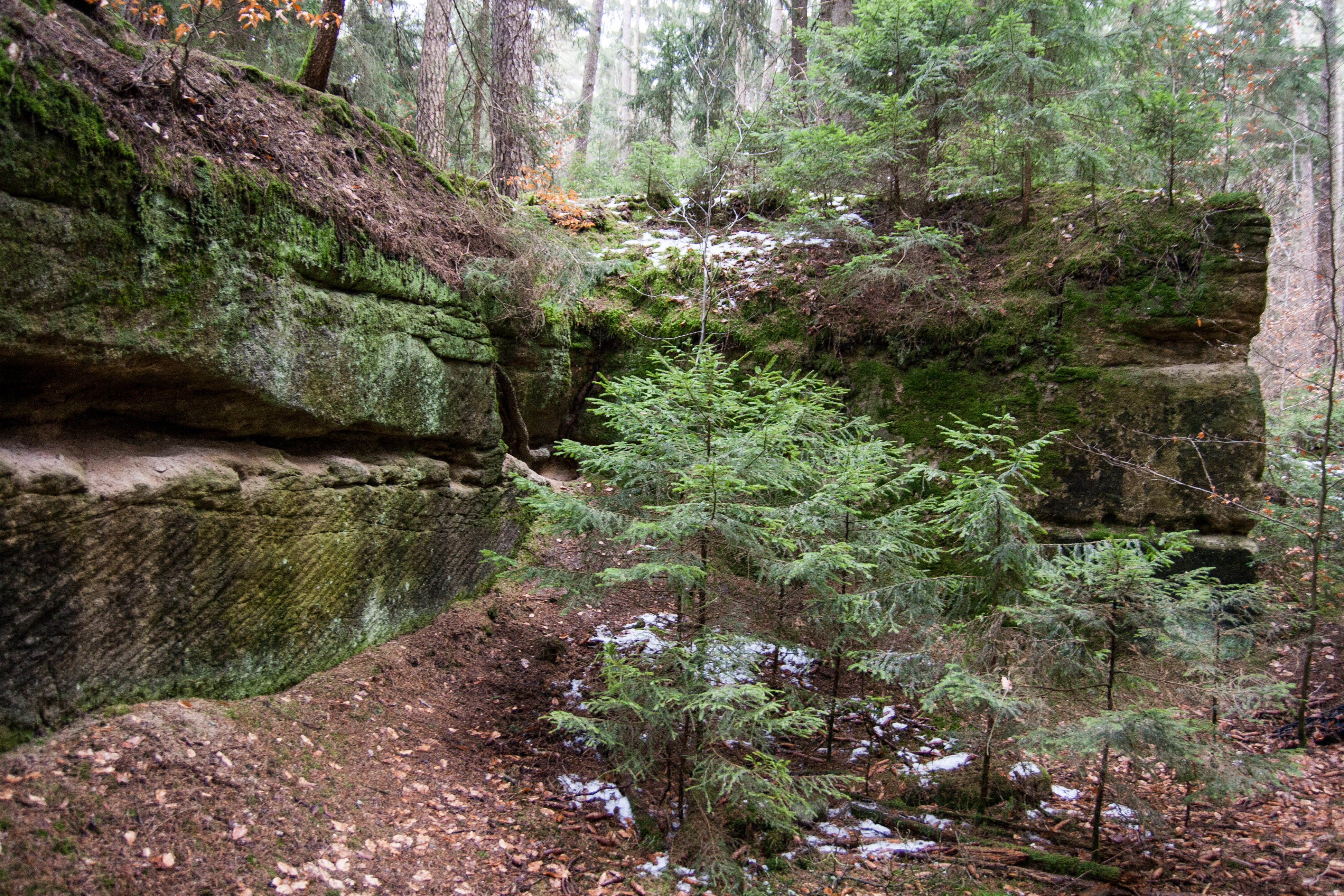 Feuchter Forst, Sandsteinbruch, Lettensturz, Bunker